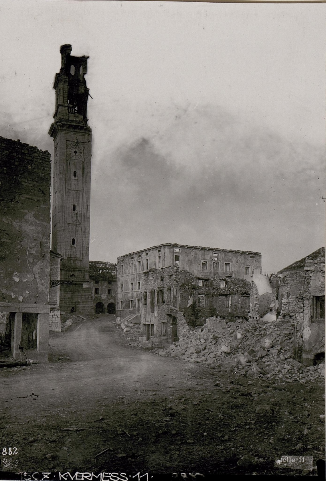 Asiago, zerstörte Kirche